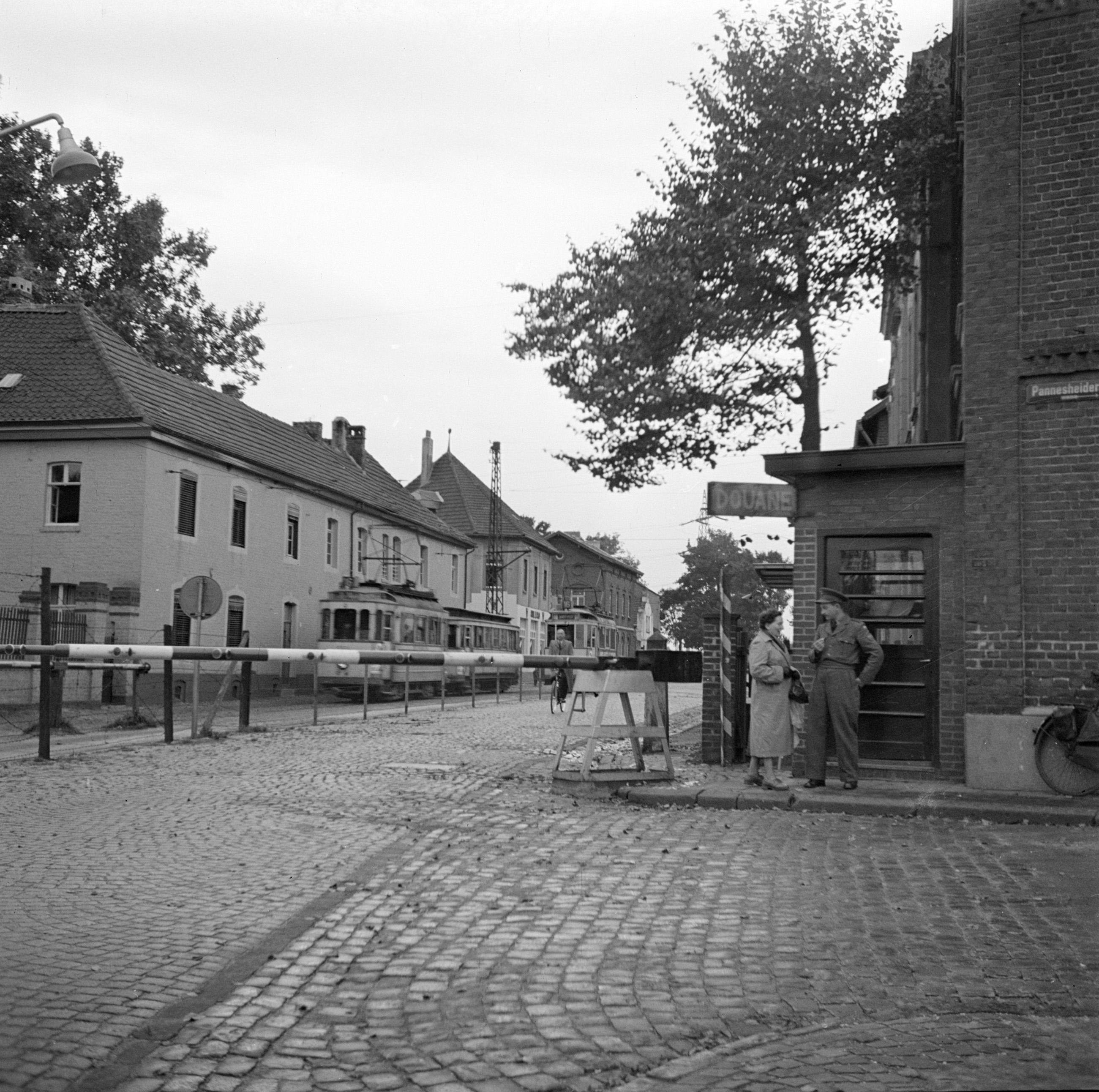 Collectie / Archief : Fotocollectie Van de Poll Reportage / Serie : Zuid-Limburg Beschrijving : Hildegard Eschen in gesprek met een douanebeambte bij de grensovergang in de Nieuwstraat Datum : 1 september 1952 Locatie : Kerkrade, Limburg, Nederland Trefwoorden : grensovergangen Persoonsnaam : Eschen, Hildegard Fotograaf : Poll, Willem van de, [onbekend] Auteursrechthebbende : Nationaal Archief Materiaalsoort : Negatief (zwart/wit) Nummer archiefinventaris : bekijk toegang 2.24.14.02 Bestanddeelnummer : 252-0217